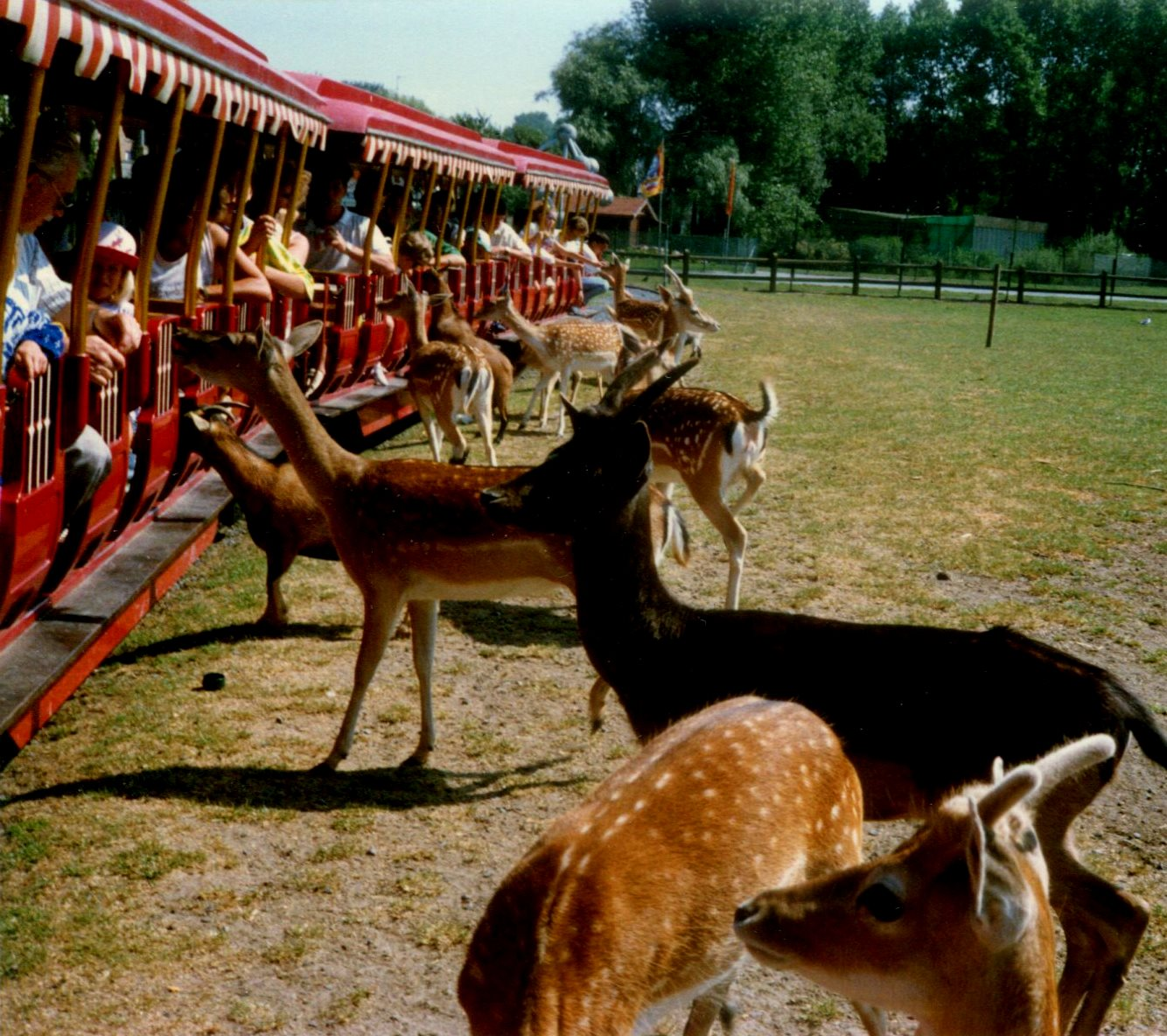 MeliparkTrain